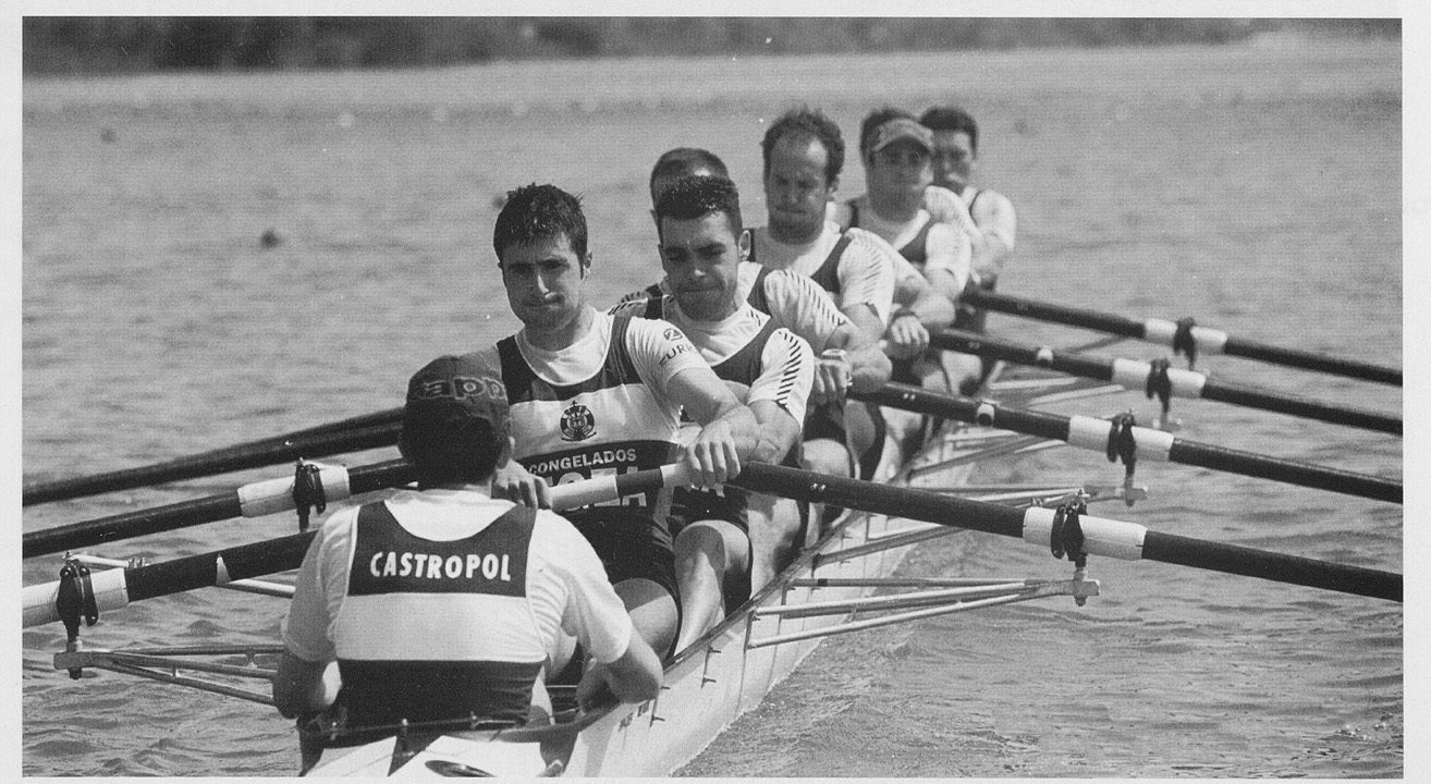 Tripulación del "ocho" de Castropol, campeona de España 2003.